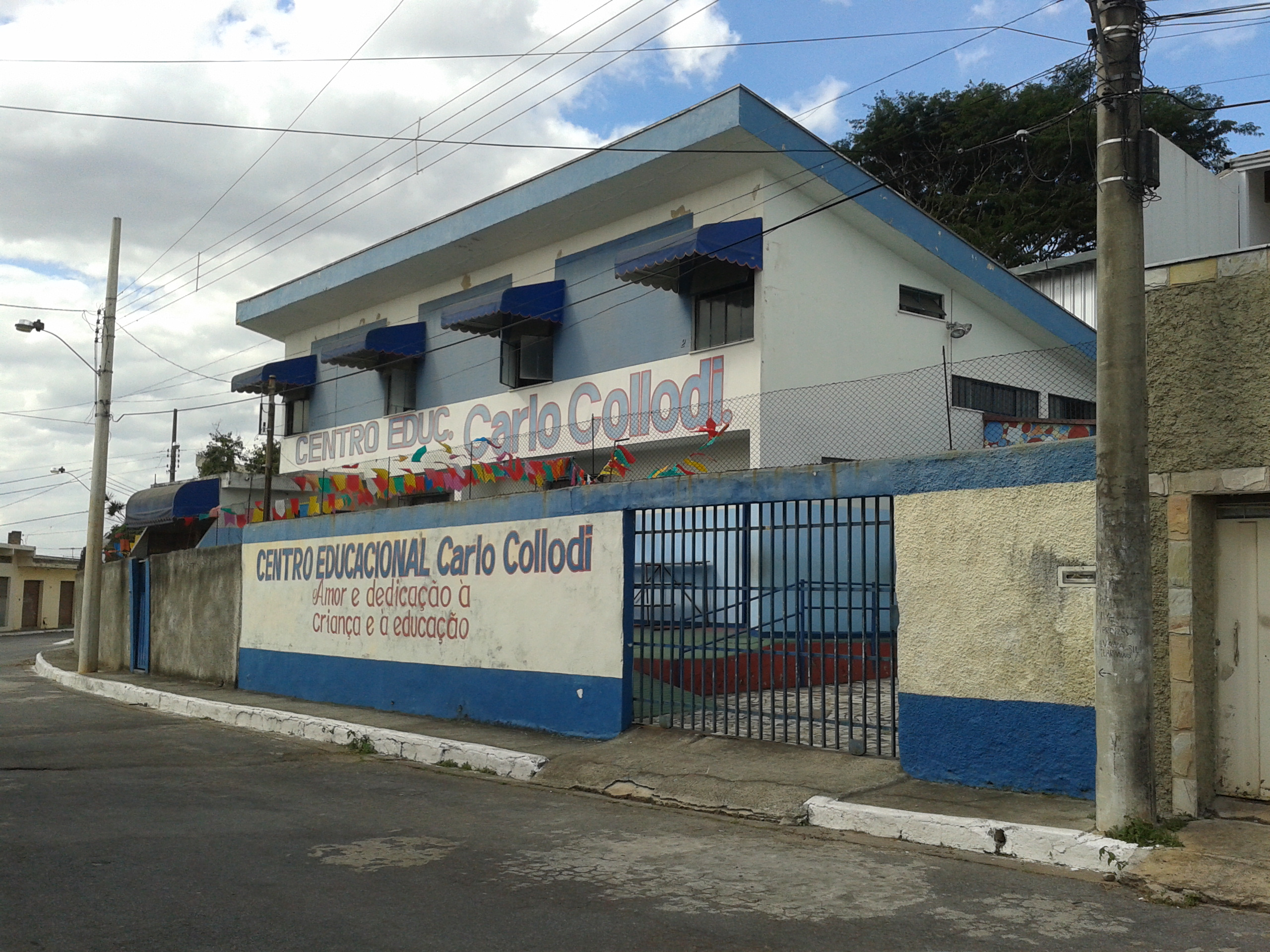 Fachada do Centro Educacional Carlo Collodi, ex-Pinóquio. Foto tirada na Rua das Guitarras, 60, Conjunto Califórnia I, bairro Califórnia, Belo Horizonte, MG